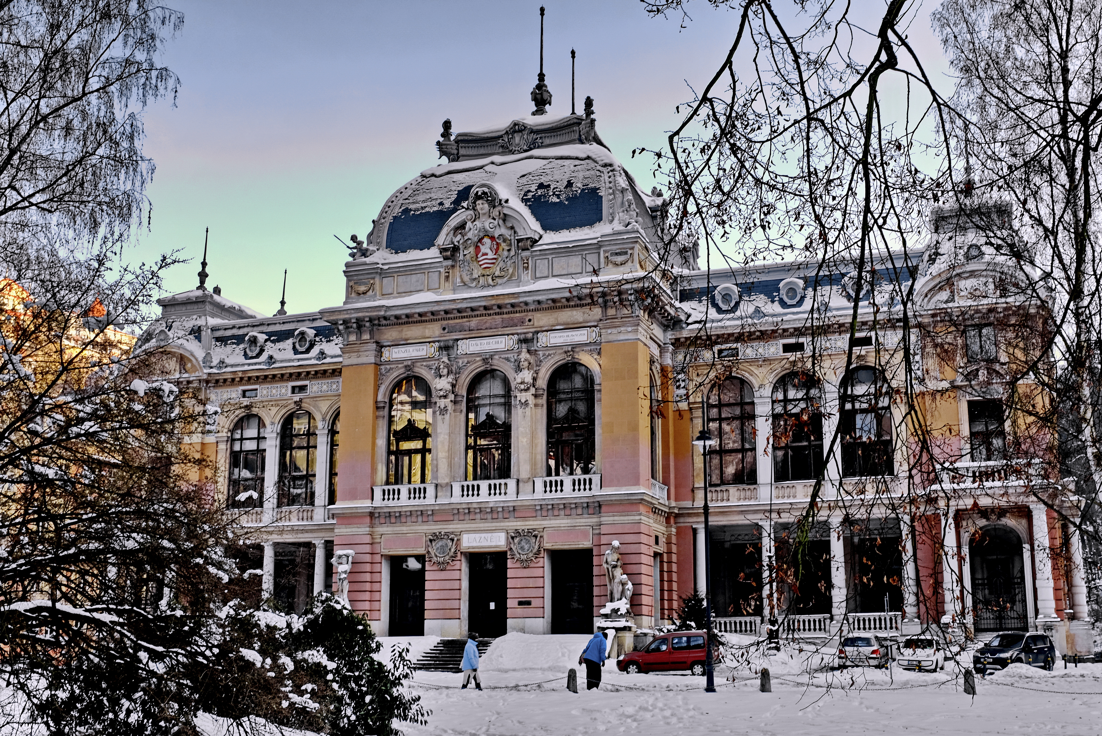 Císařské lázně, Mariánskolázeňská 306/2, Karlovy Vary.